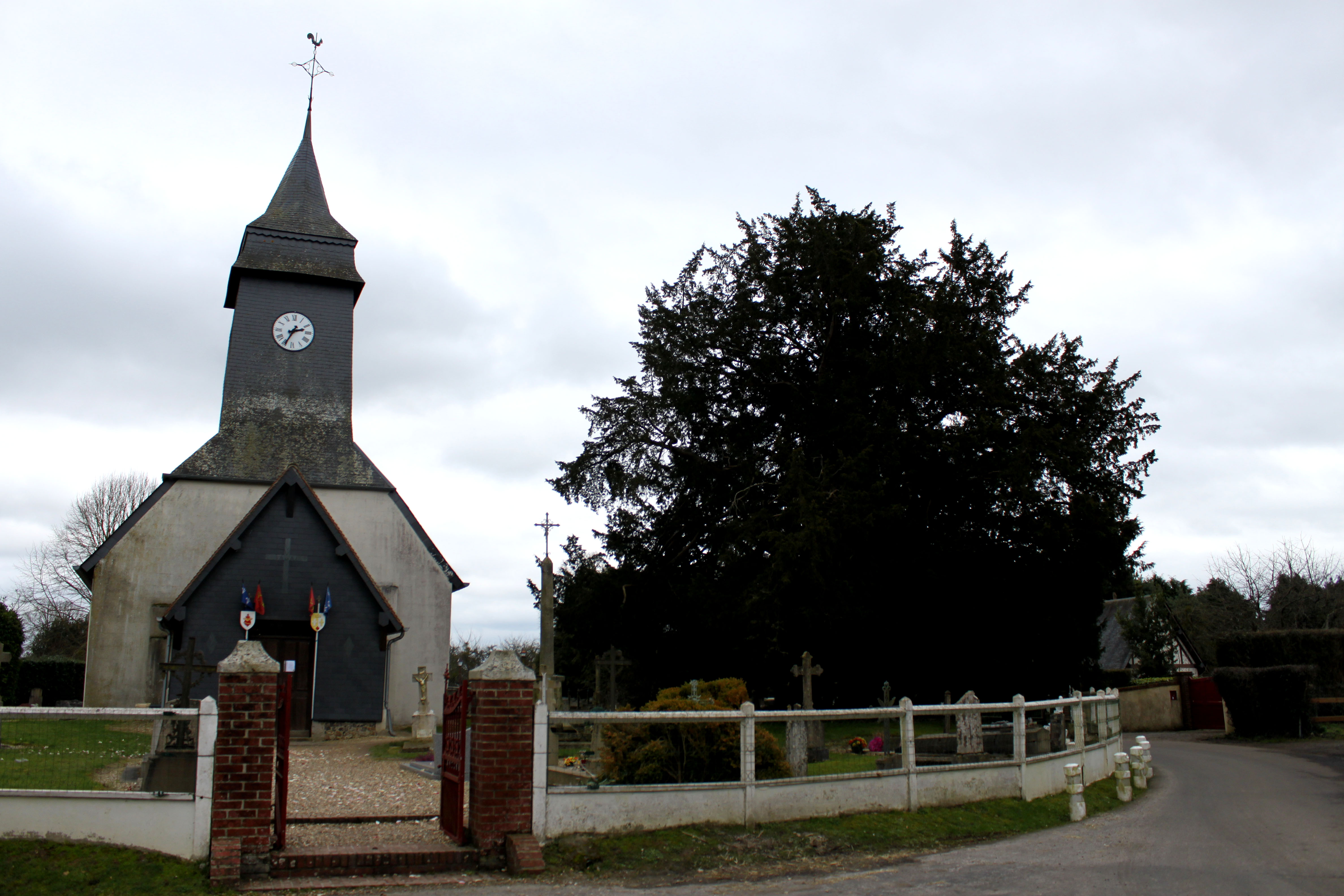 L'église